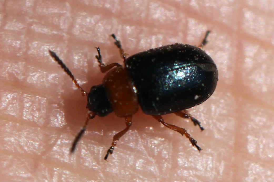 Knöterichblattkäfer (Gastrophysa polygoni) am 10.4.2017 in Walldorf/Baden